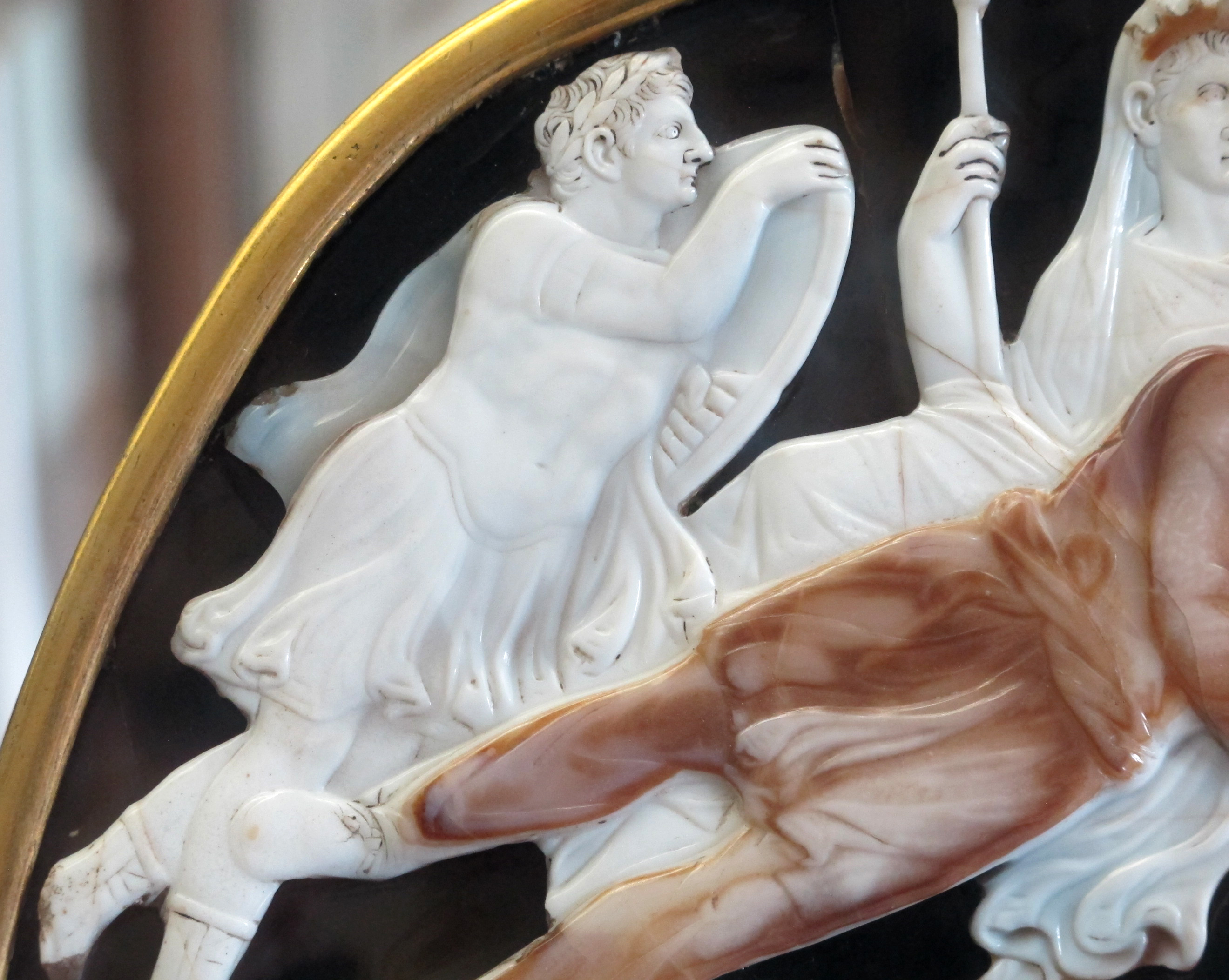 Arte romana, gran cammeo della ste chapelle con esaltazione della dinastia giulio-claudia, 23 dc ca., druso minore